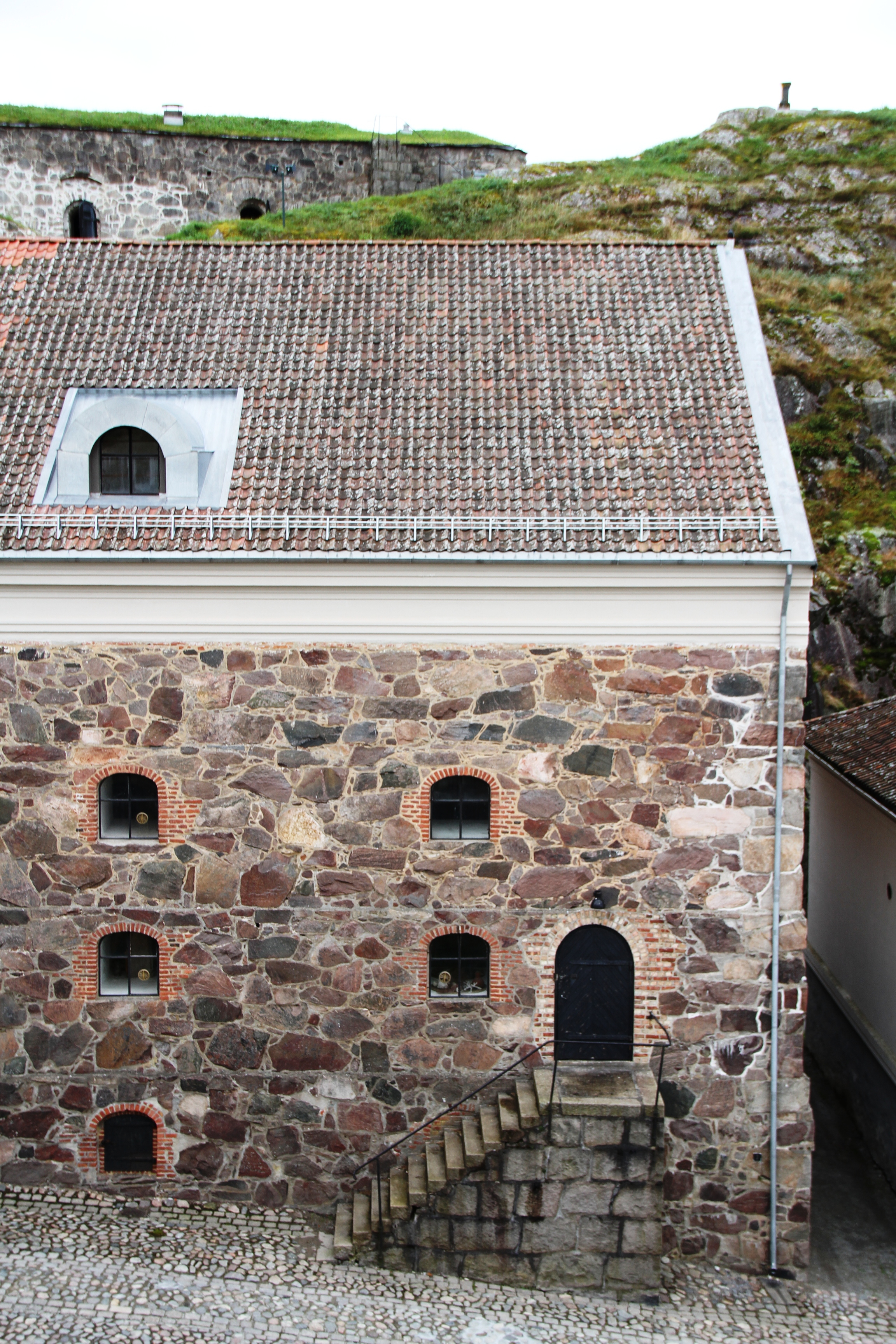 Fredriksten fortress in the city of Halden (Østfold), southeastern Norway